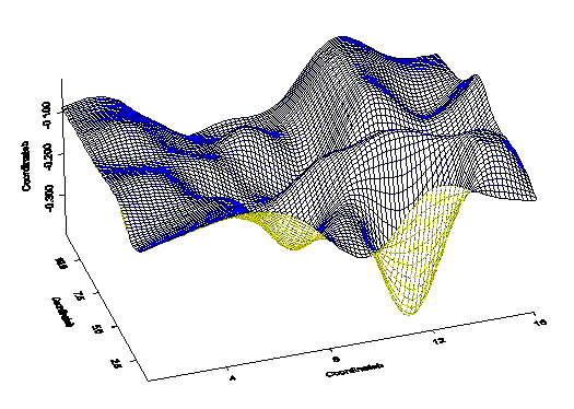 Mappa ECG